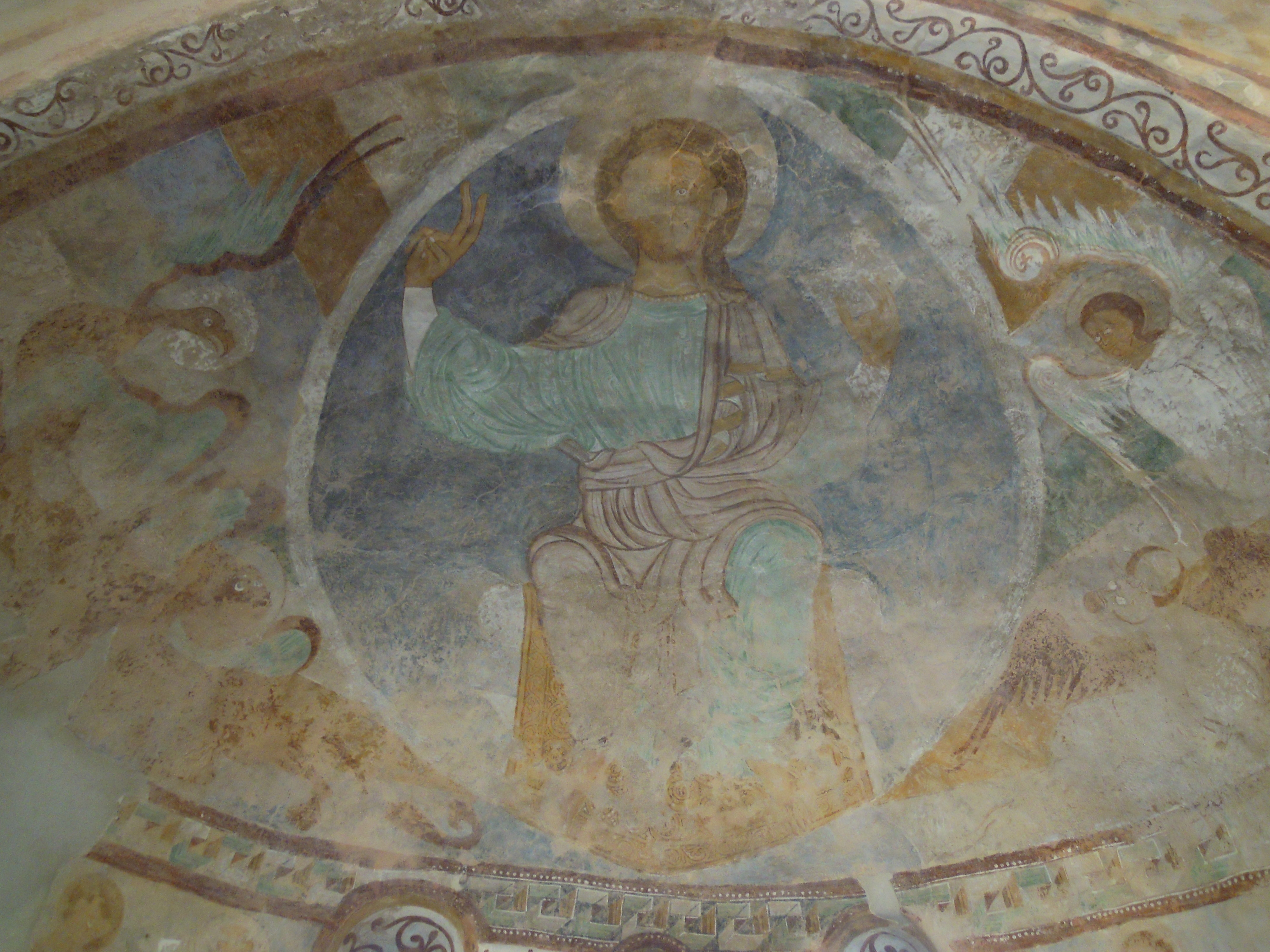 Cristo in mandorla